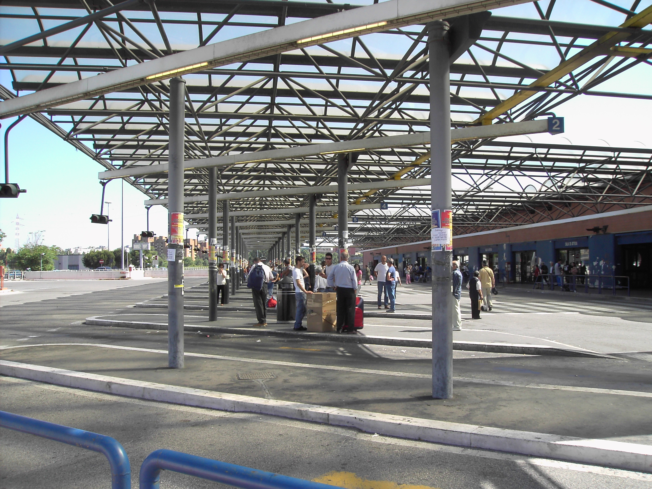 Roma, stazione bus interurbani Ponte Mammolo, di scambio con la metropolitana linea B